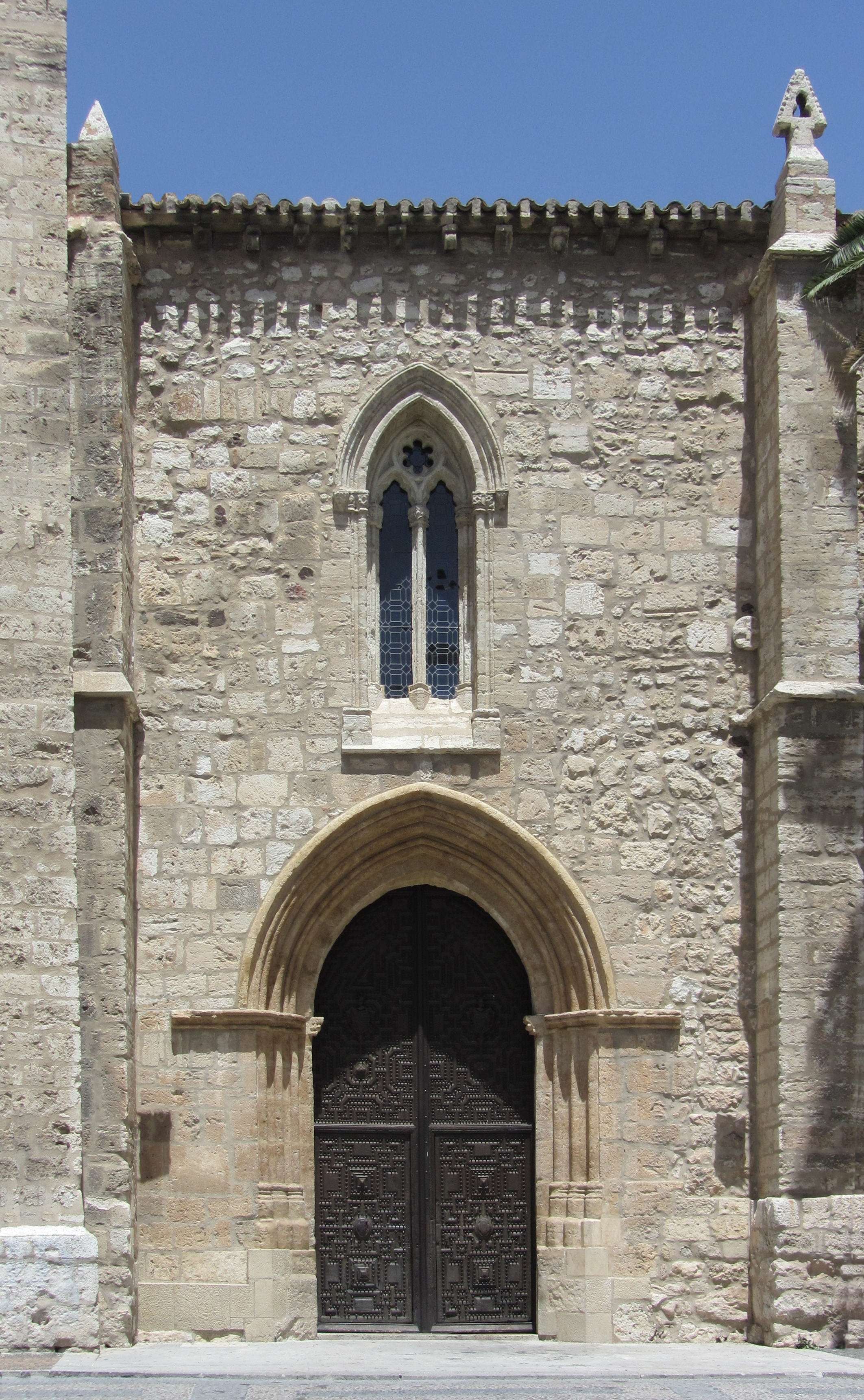 Puerta del Sol de la Iglesia de San Pedro en Ciudad Real (España) de la segunda mitad del siglo XIV.